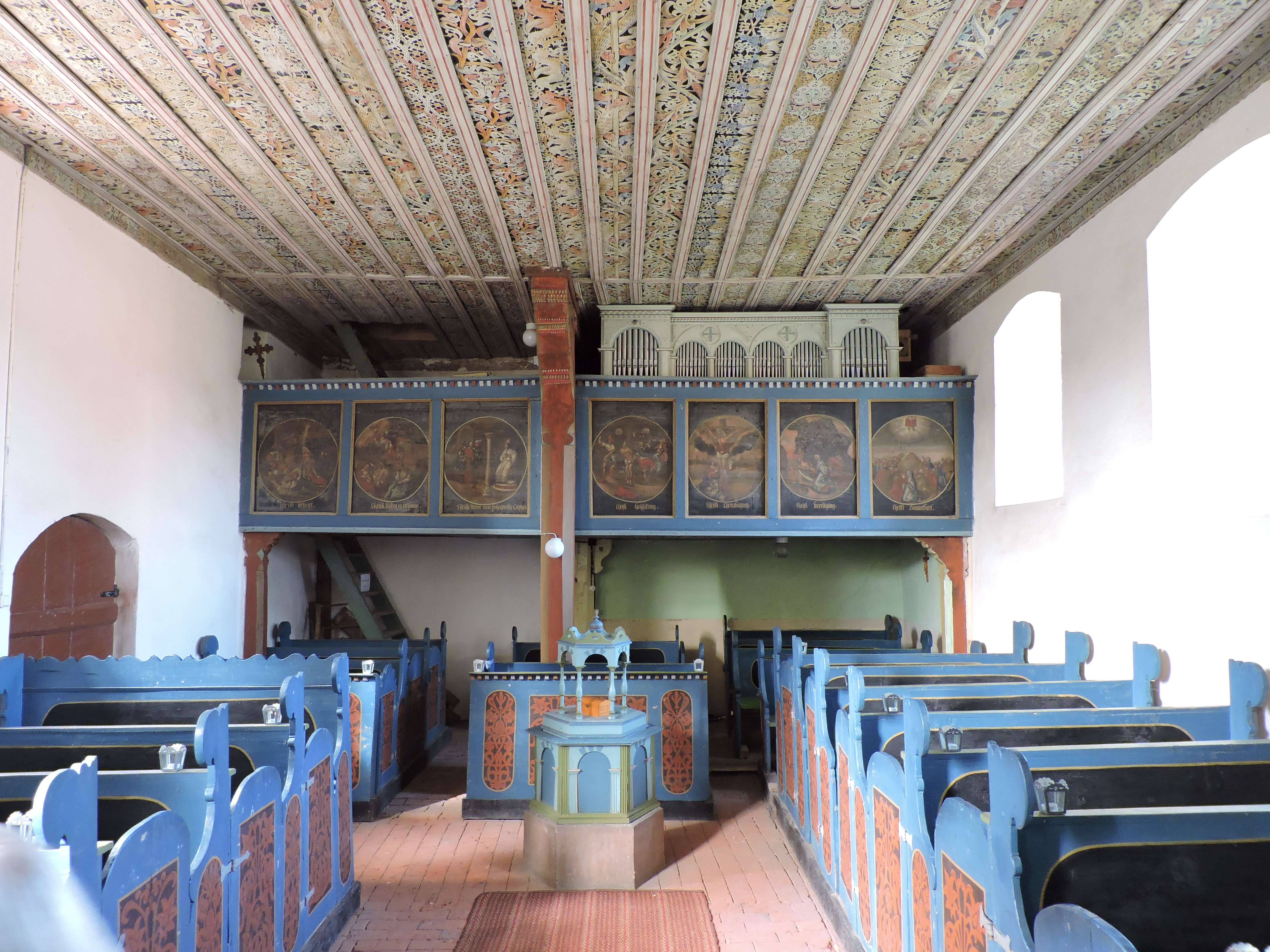 Kirche Maxdorf (Salzwedel) Taufe, Empore